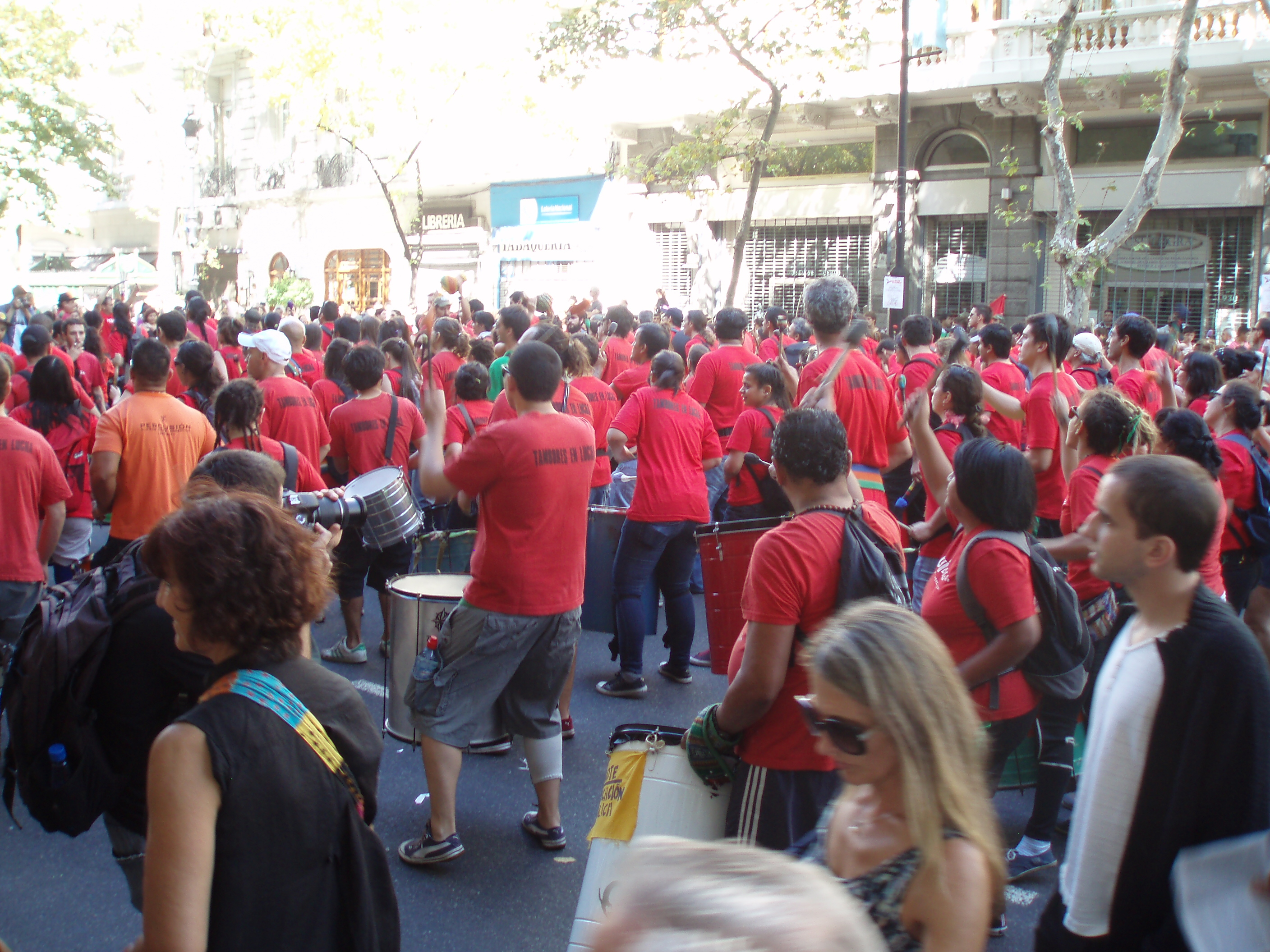 El grupo La Chilinga participa del 24 de marzo de 2013 en Buenos Aires.